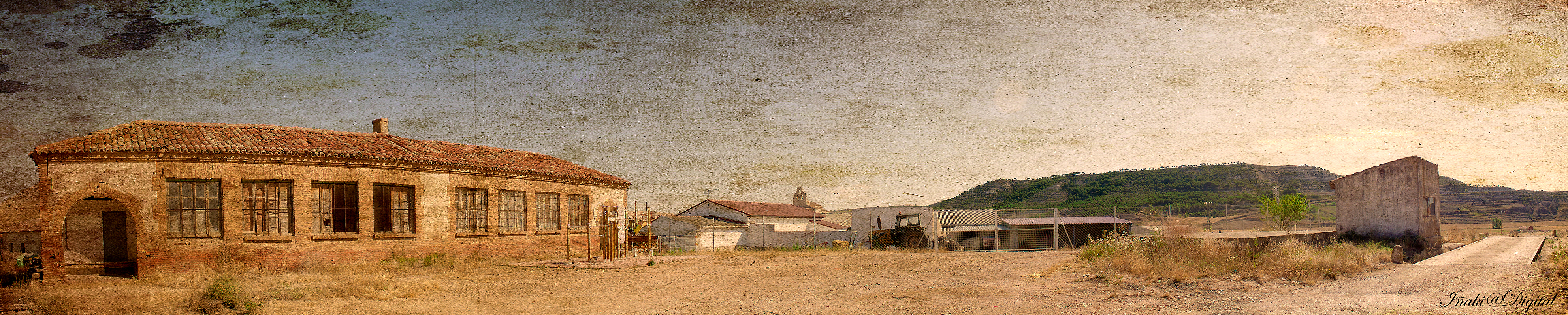 Llega Septiembre y llega tambien la vuelta al cole. Estas son las antiguas escuelas de mi pueblo, llevan años abandonadas y en estado casi de ruina lo que es una pena. Aqui inicie yo mi colegio donde estabamos juntos los niños de 5 años con los mayores de 14. A la derecha de la imagen se encuentra la bascula municipal